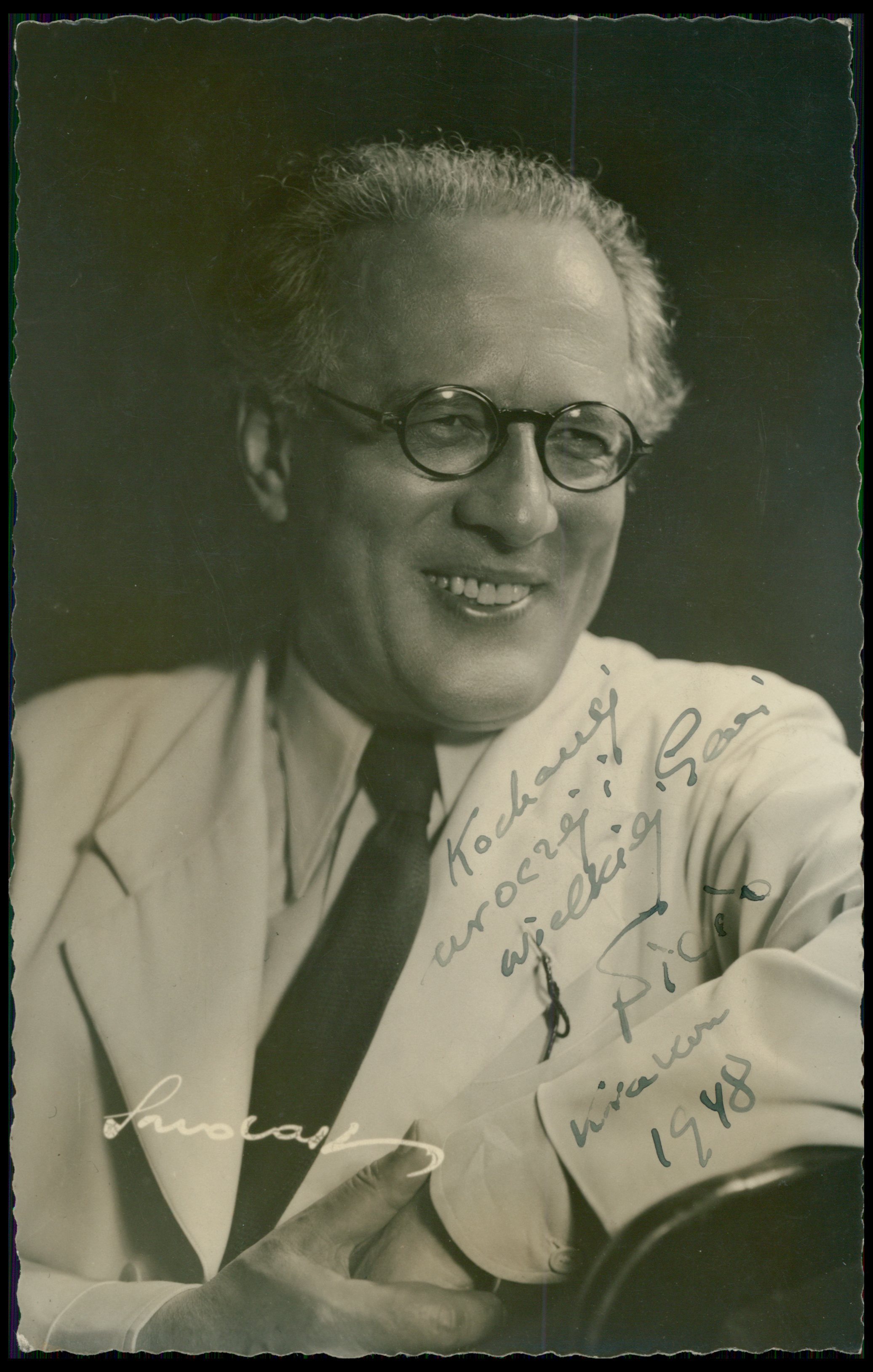 Grzegorz Fitelberg